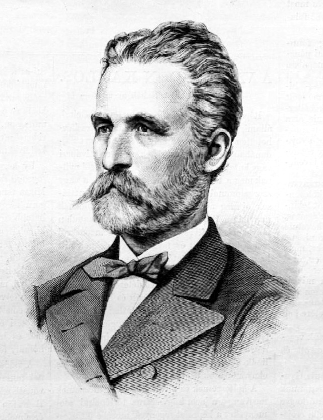 Kautz Gyula (1829–1909) közgazdász, egyetemi tanár, a Magyar Tudományos Akadémia rendes tagja portréja. Fametszet